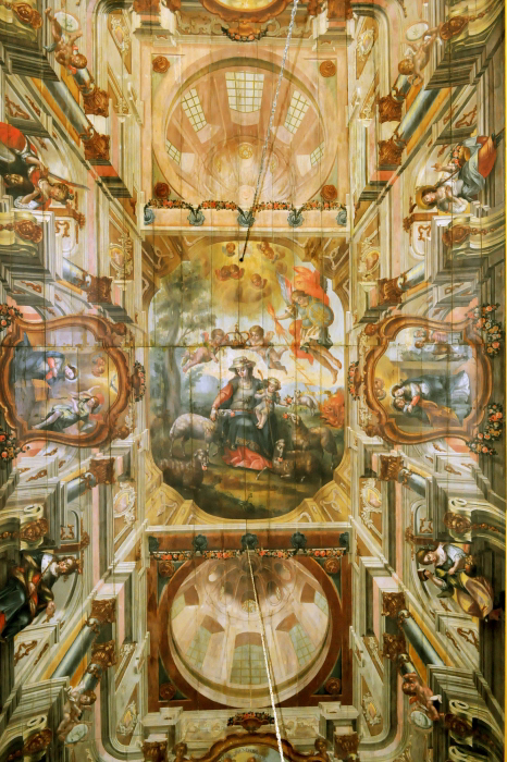 A Divina Pastora, teto da Matriz de Divina Pastora, Sergipe